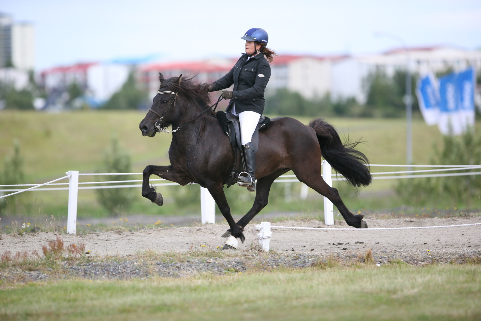 Svanhvít Kristjánsdóttir Dama frá Flugumýri II Brúnn/milli- einlitt Sleipnir